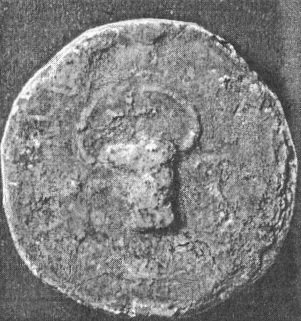 Hahót nembeli (II.) Buzád körpecsétje, 1232-33 előtt (ökörfej kereszttel)